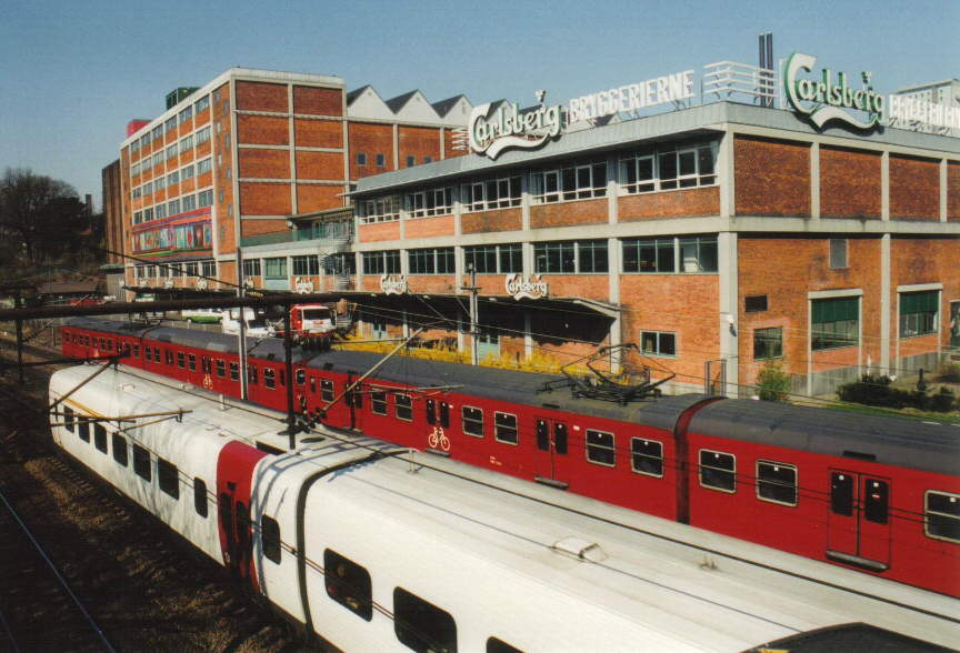 Carlsberg-Brauerei in Kopenhagen, 4. April 2002. Sie befindet sich etwa auf halber Strecke zwischen dem Kopenhagener Hauptbahnhof (København H) und Valby. In Die Olsenbande stellt die Weichen setzten die drei Gauner beim Rangieren mit dem Tresorwagen der Firma Franz Jäger Berlin nebenbei einen Ausflugswagen der Polizei hier ab. Dies führte zum Erfolg des Polizeiausflugs und zur Beförderung von Kommissar Jensen. Aufnahme: Steffen Mokosch